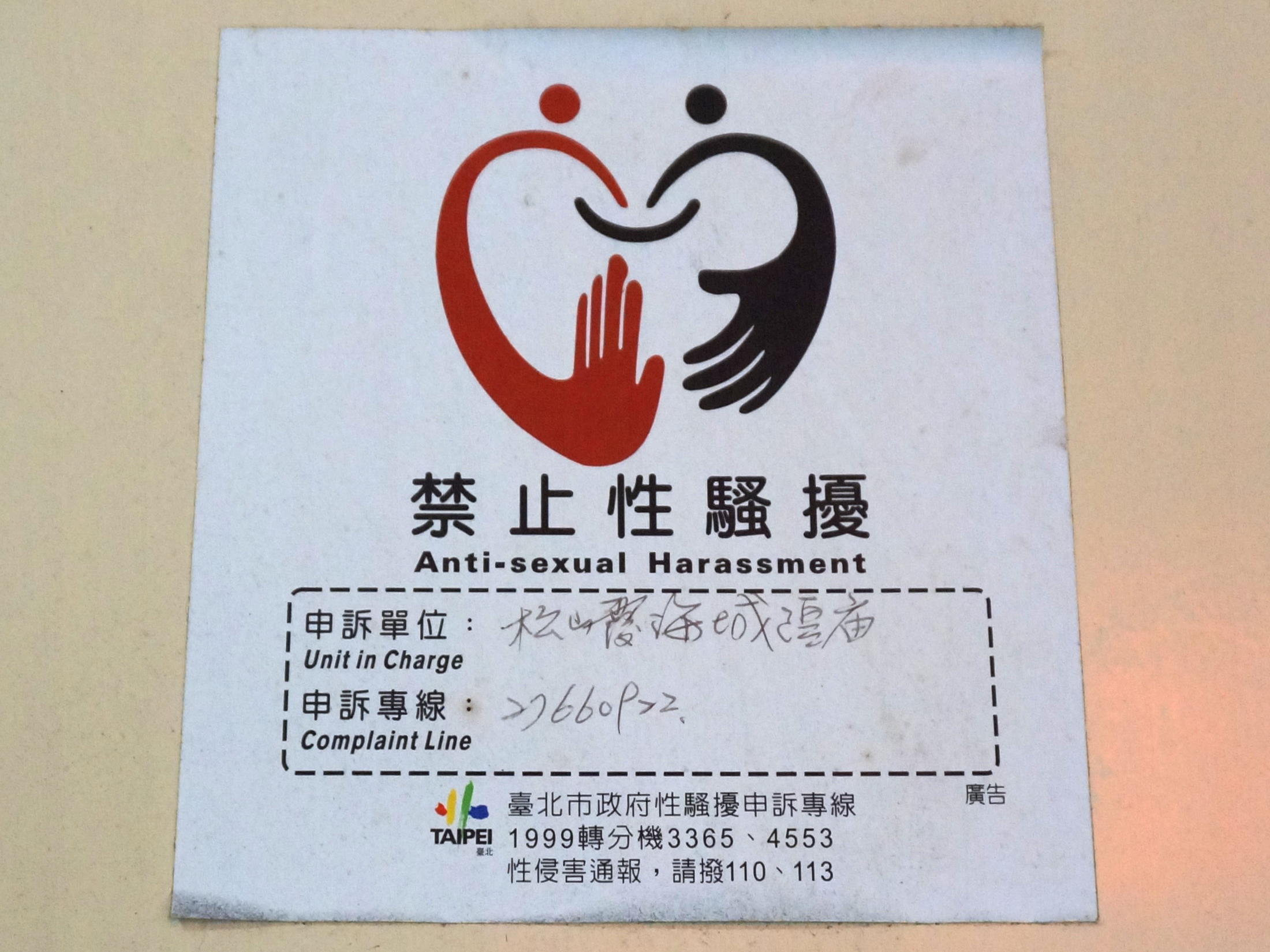 中文（台灣）: 松山霞海城隍廟內部牆面張貼的臺北市政府「禁止性騷擾」貼紙。